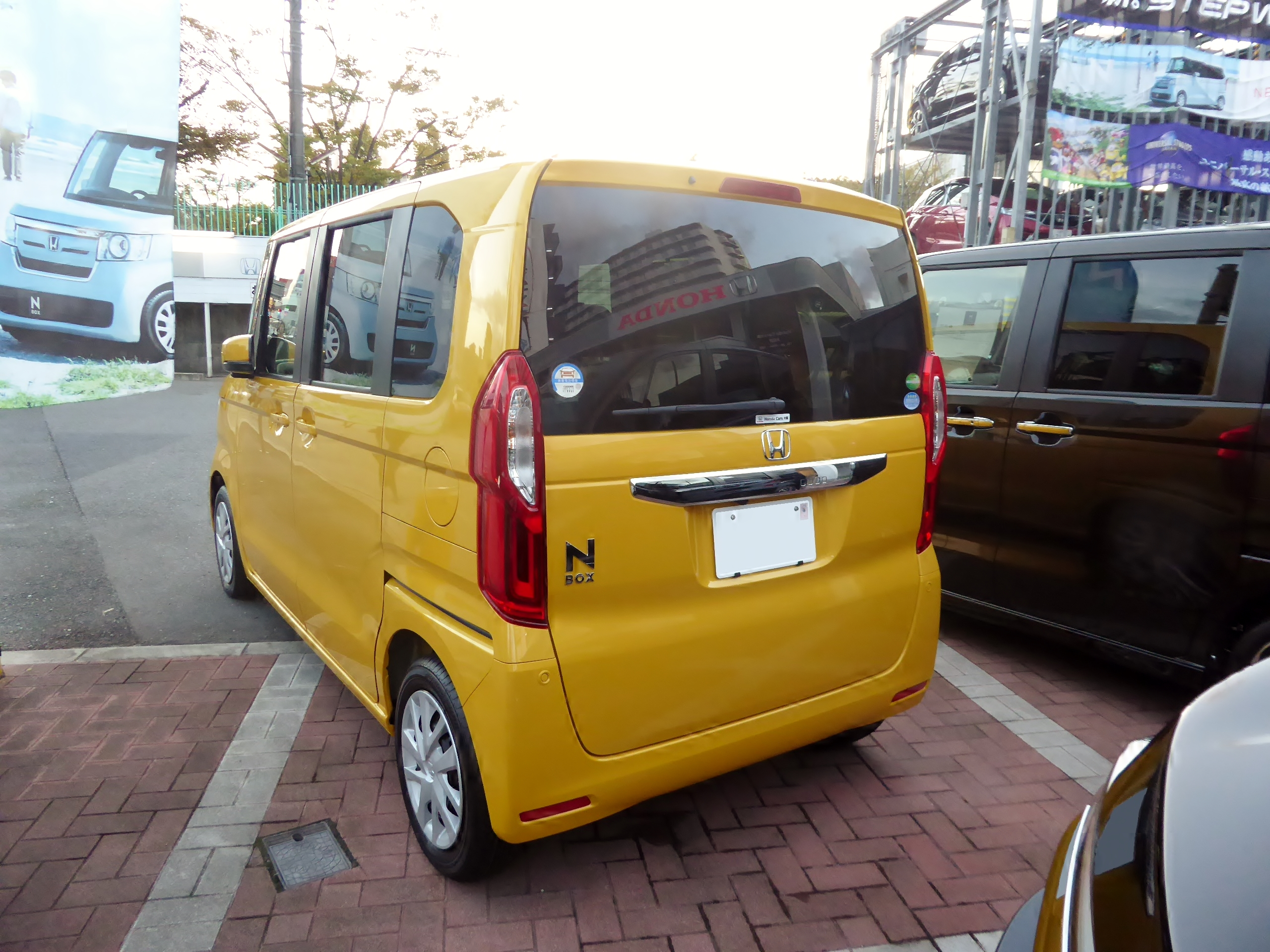 DBA-JF3型ホンダ・N-BOX G・EX Honda SENSINGをリアから撮影。